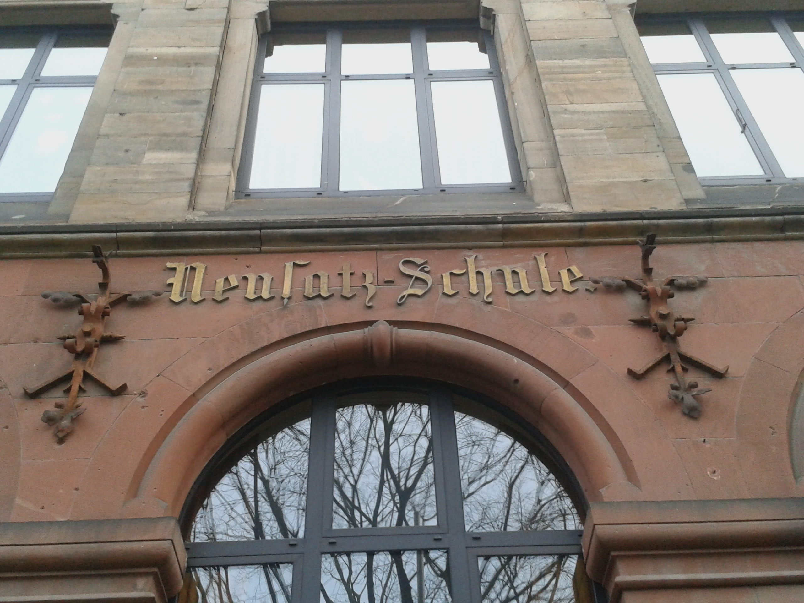 Schriftzug Neusatz-Schule